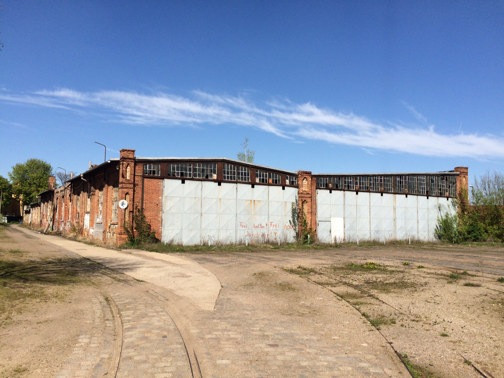 Wagen- und Werkstatthalle (1902)des Betriebshofes Ammendorf in Halle (Saale)